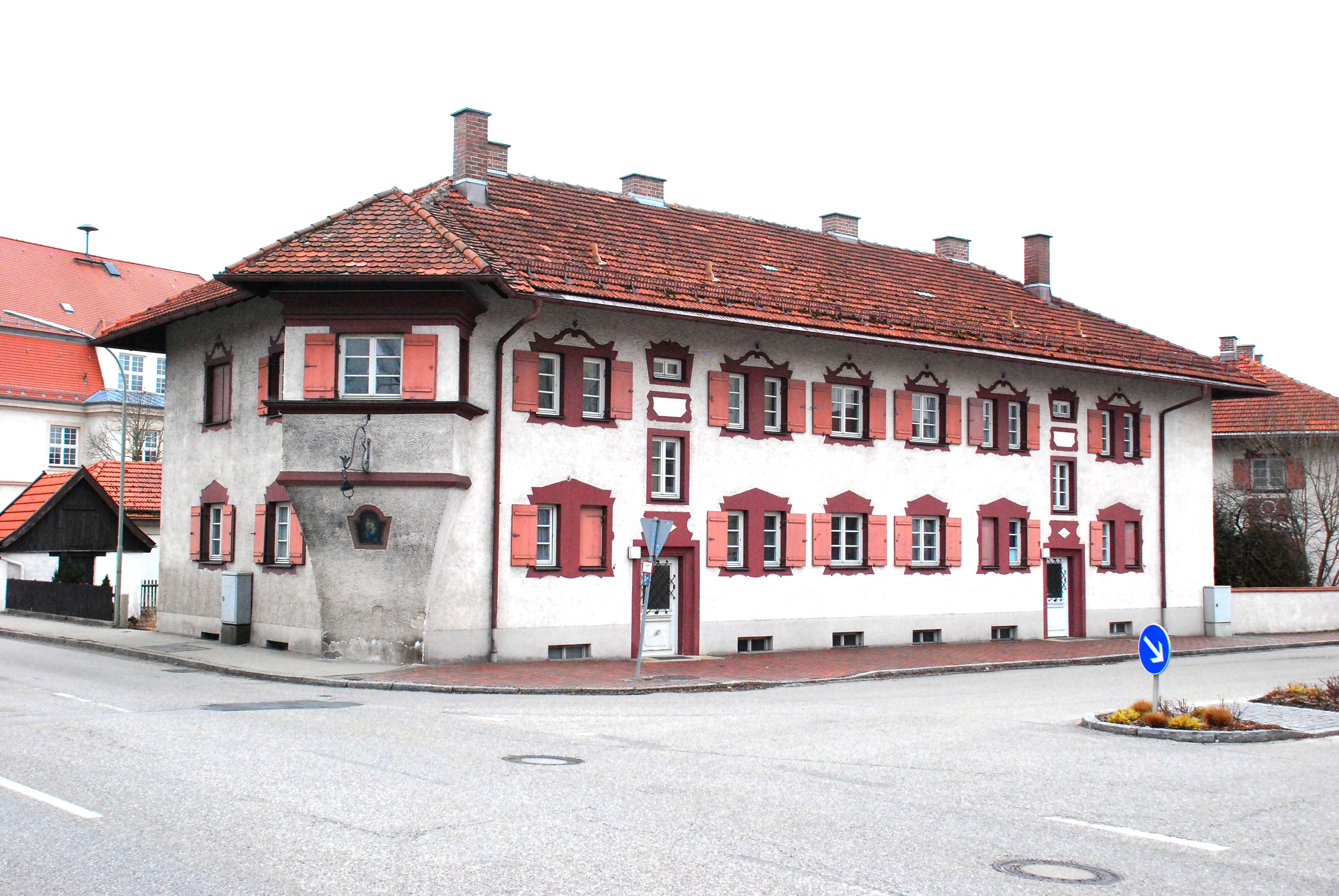 Wohnhaus Turnstraße 1 in Garching an der Alz, Landkreis Altötting, Regierungsbezirk Oberbayern, Teil der ehemalige SKW-Werkssiedlung, errichtet durch von Otto Rudolf Salvisberg um 1924. Als Baudenkmal unter Aktennummer D-1-71-117-35 in der Bayerischen Denkmalliste aufgeführt.